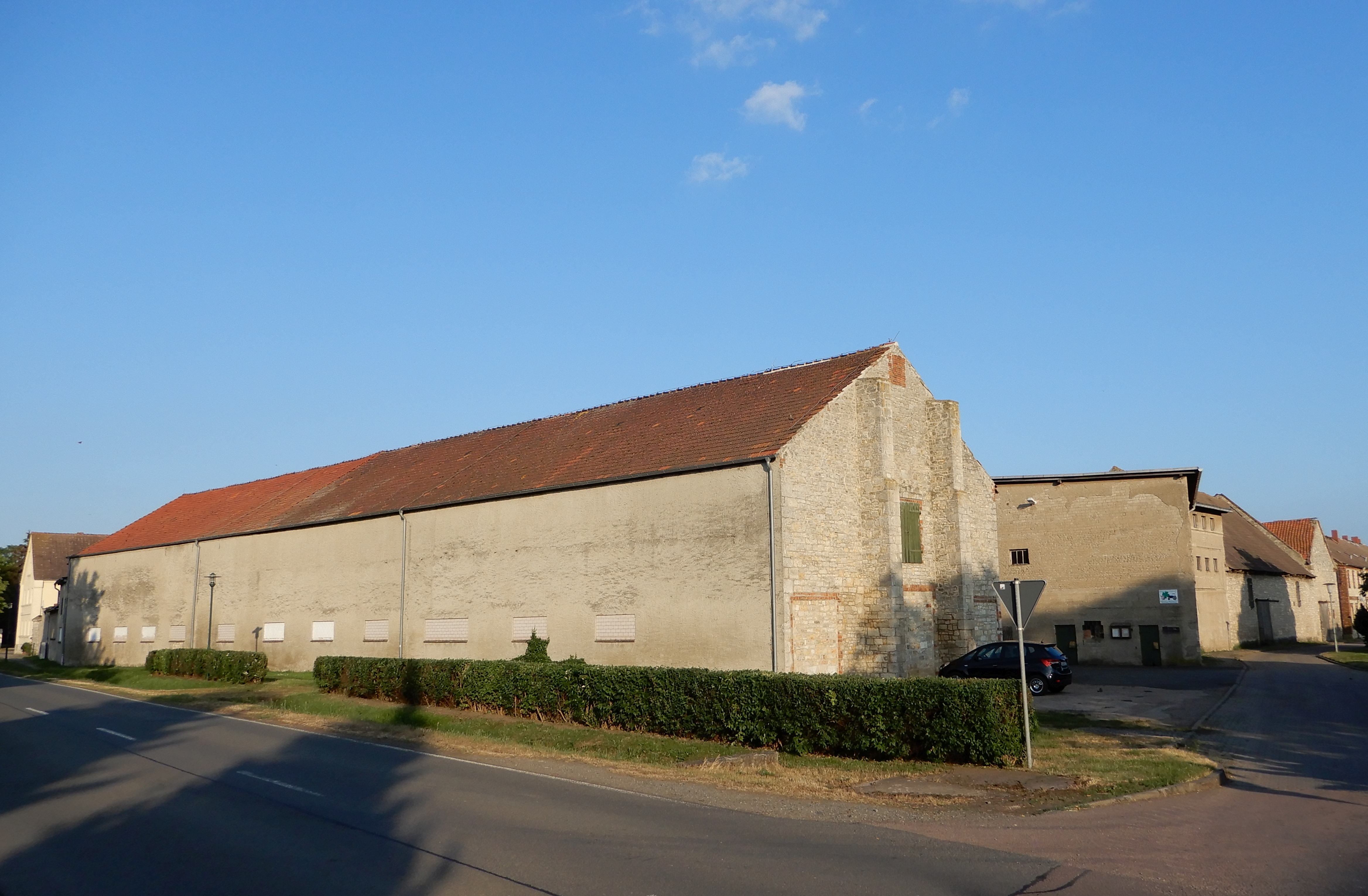 Gutshof Chausseestraße 14 (Friedrichsaue)